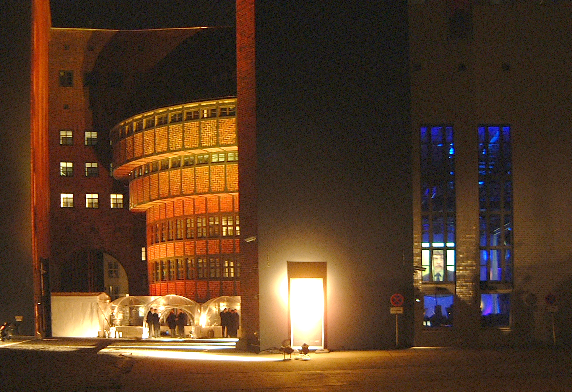 ort der Vergabe des BIENE-Award 2006: ewerk in der Wilhelmsstraße Berlin